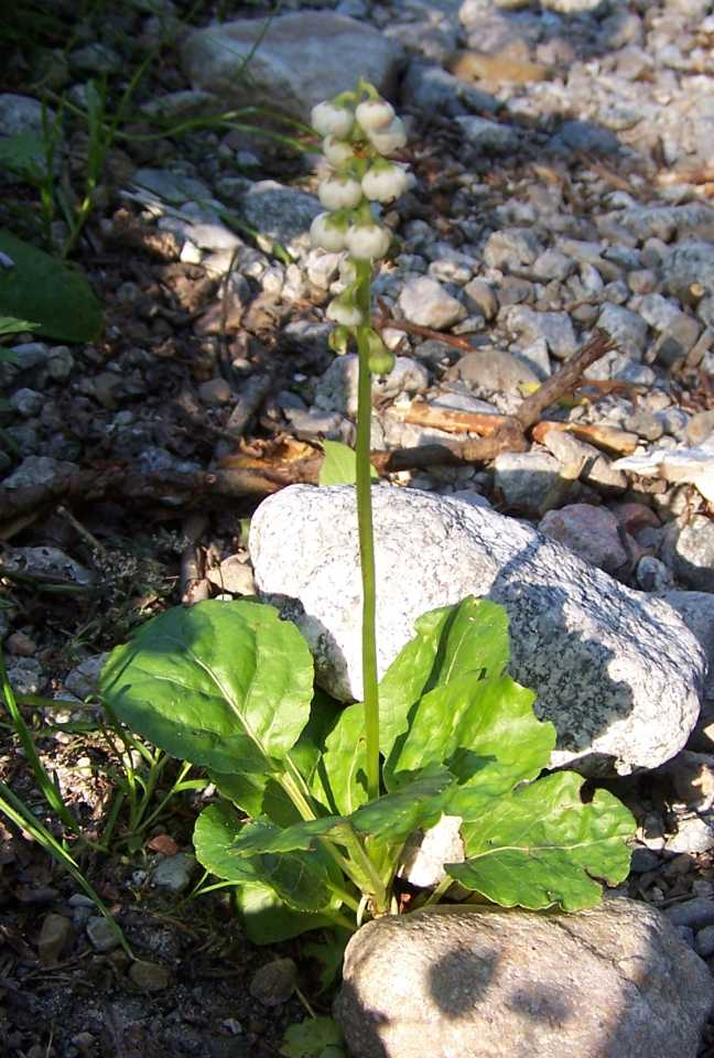 Pyrola minor (pl. gruszyczka mniejsza)